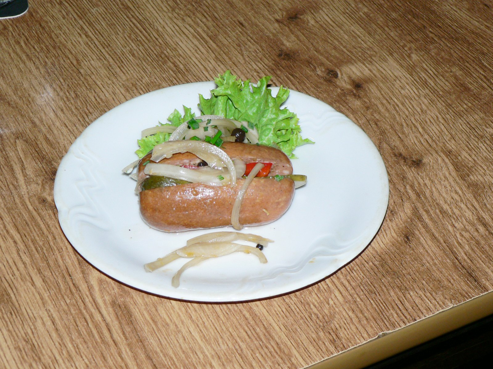 Sposób serwowania knedlika.